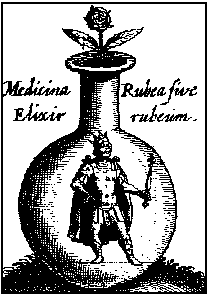 Red Elixir